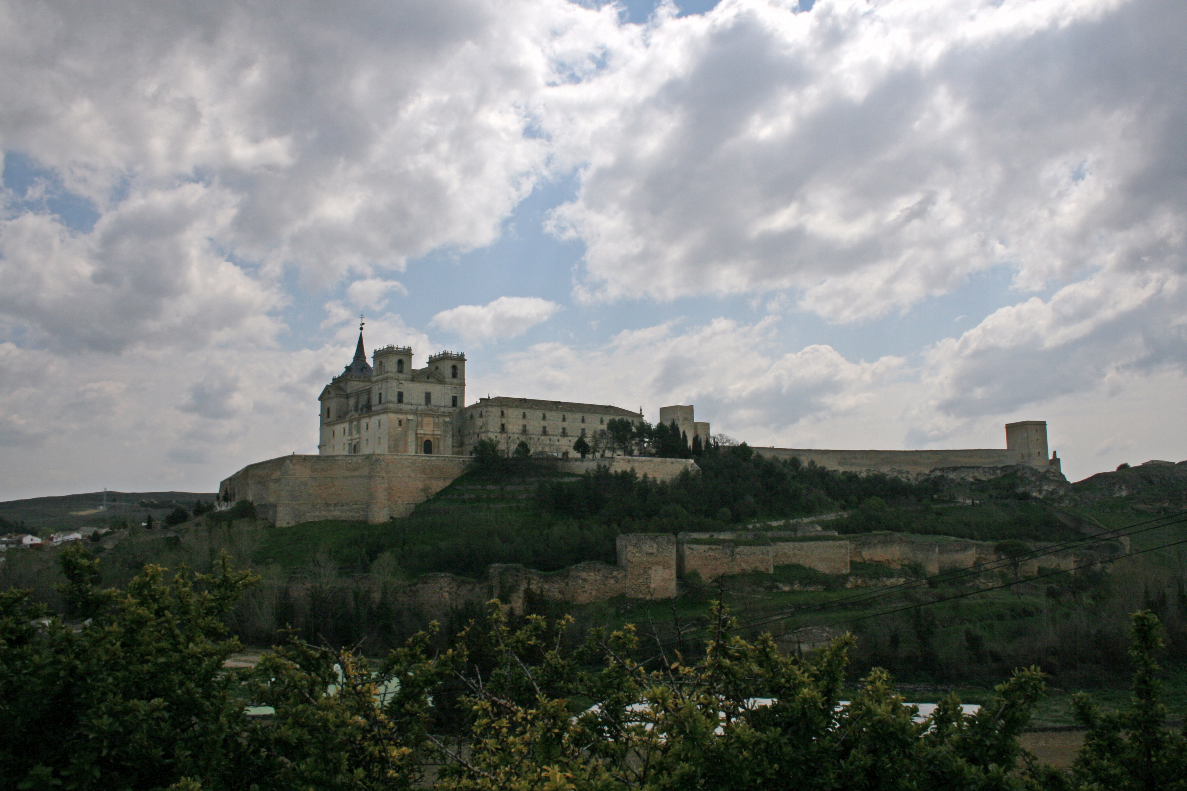 Monasterio de Uclés, Cuenca, España - Vista desde el oeste